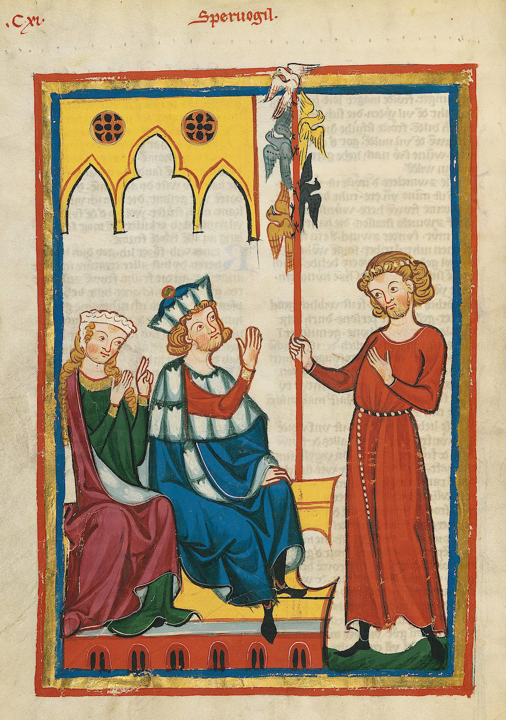 Codex Manesse, UB Heidelberg, Cod. Pal. germ. 848, fol. 415v, Spervogel